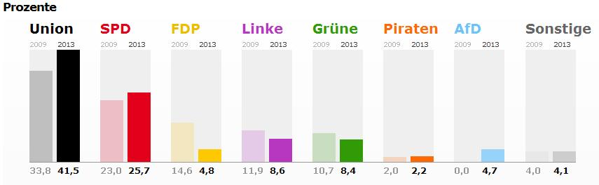 조선말: 2013년 독일연방연합 선거 퍼센트 득표율입니다.